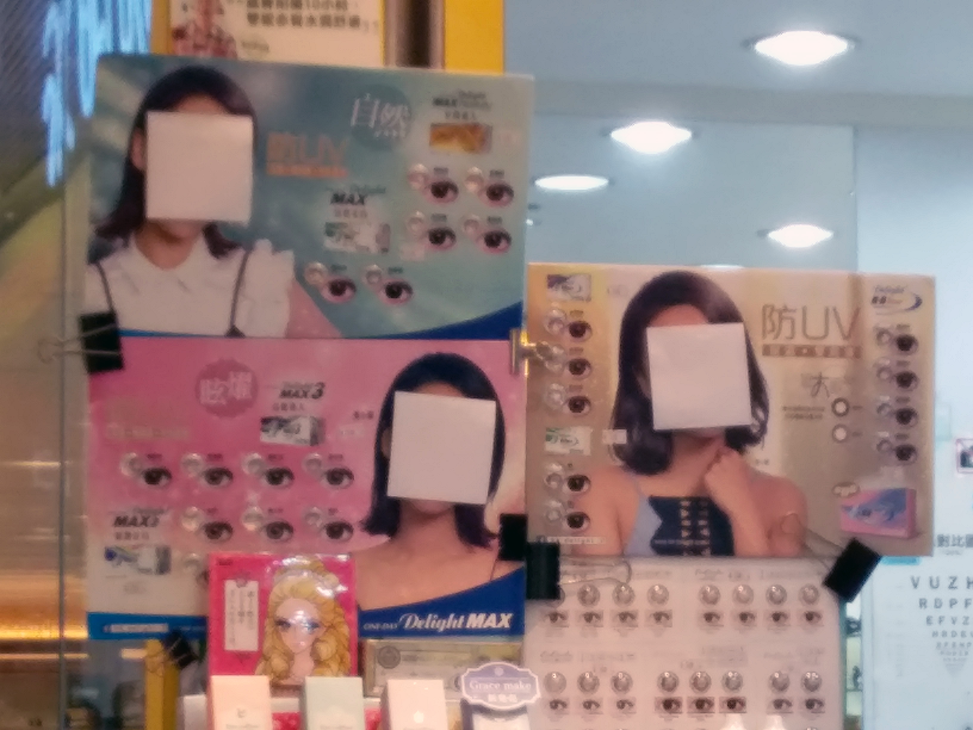 中文（香港）: 香港有眼鏡店因應「反對黃心穎浪潮」，以紙張遮蓋黃心穎於廣告中之肖像。